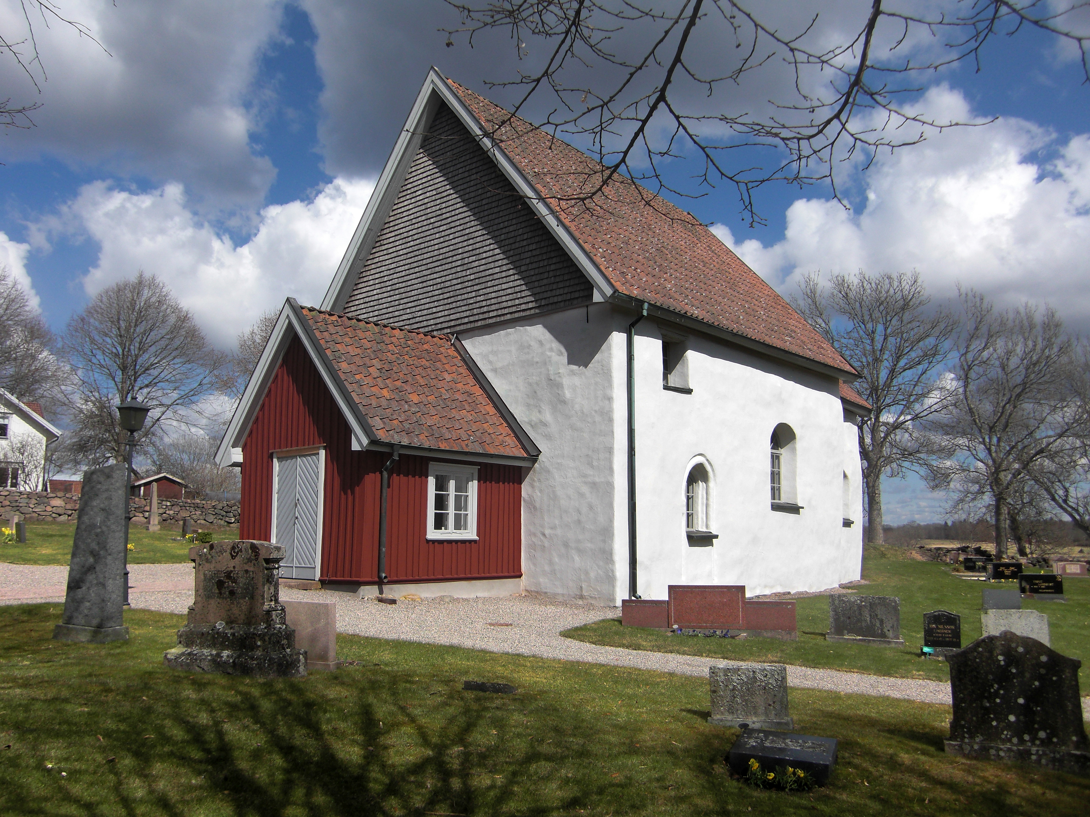 Exteriör av Mjäldrunga kyrka i Mjäldrunga socken, Gäsene härad, Herrljunga kommun, Skara stift, f.d. Älvsborgs län, Västergötland, Västra Götalands län, Sverige.